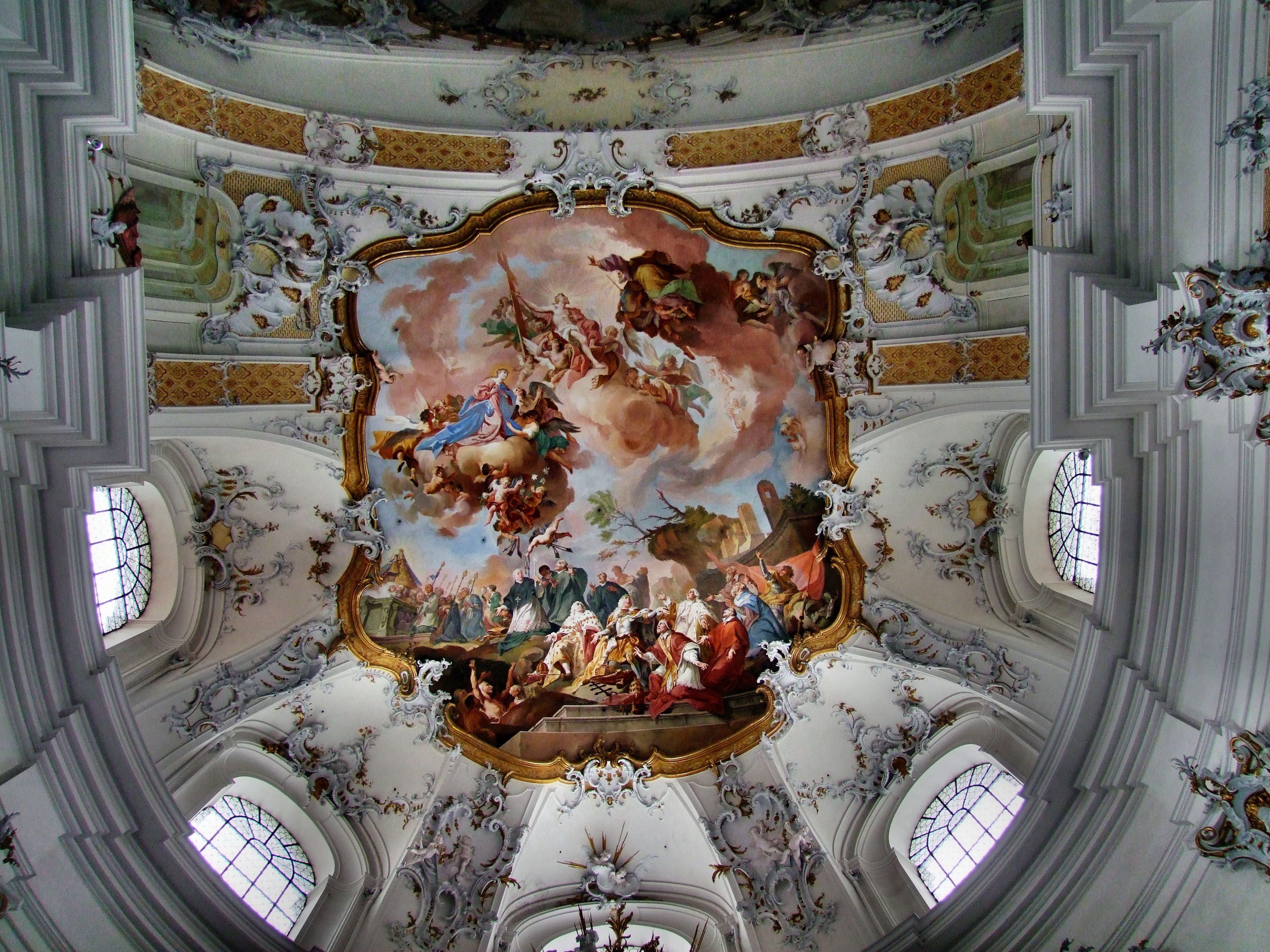 Gnadentreppe - Fresko im westlichen Querhaus (F29), Basilika Ottobeuren